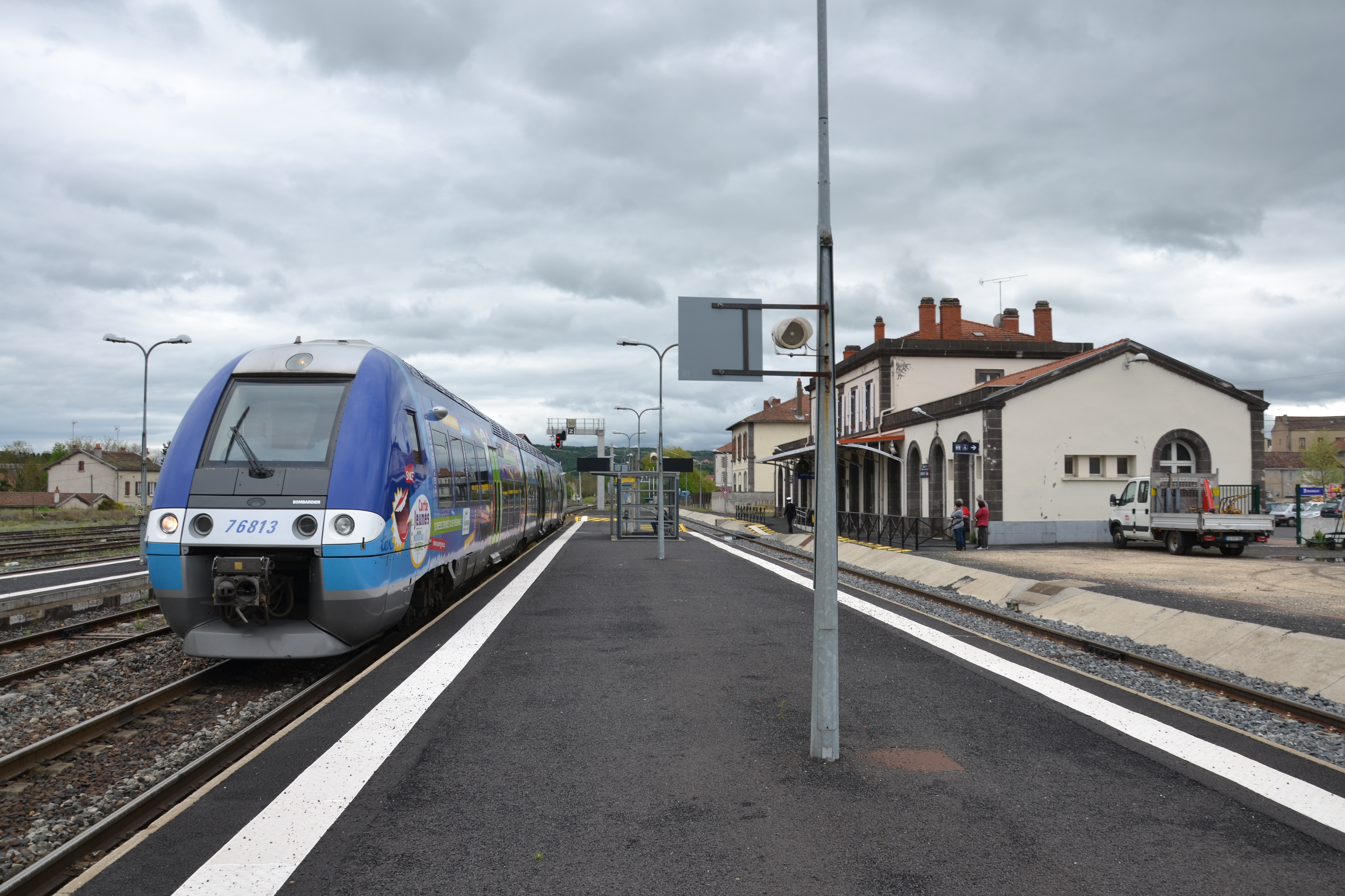 Arrêt du TER n°873990 en provenance de Brioude et destination de Clermont-Ferrand